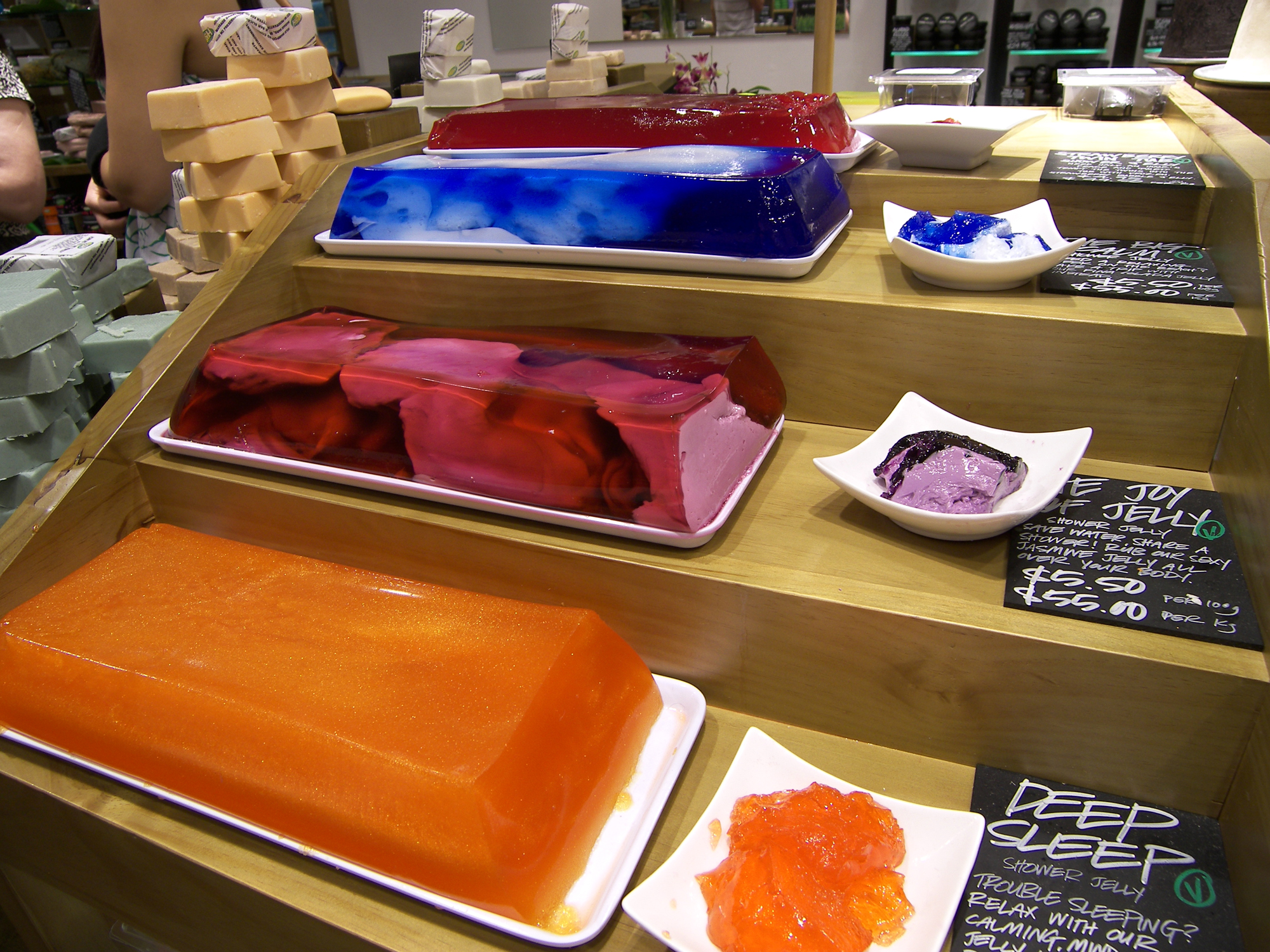 Again I'm serious